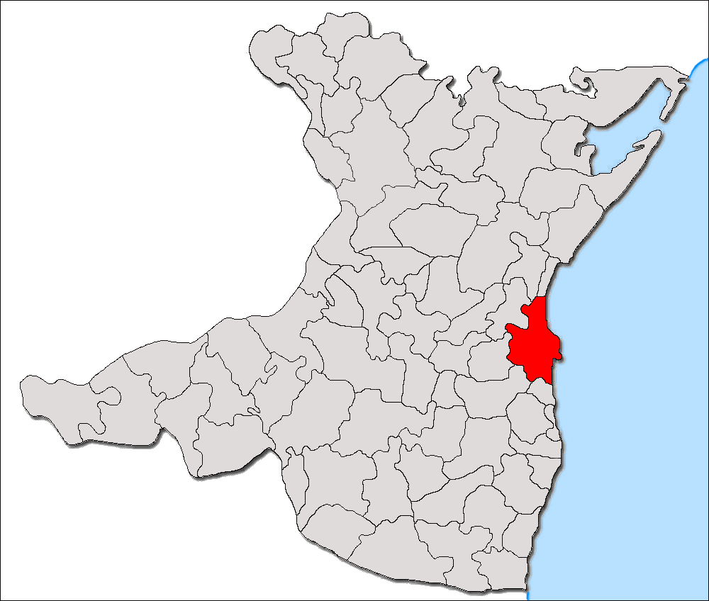 Categorie:Hărţi ale judeţului Constanţa